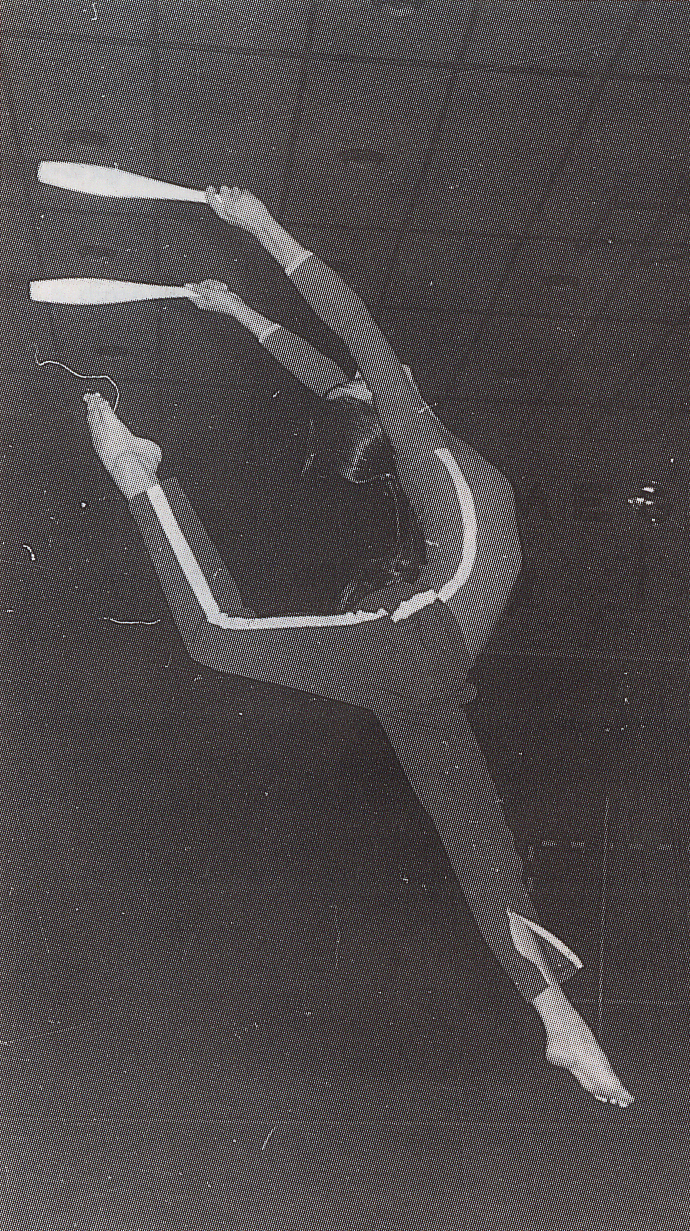 La gimnasta rítmica española Concha Corrales durante un ejercicio de mazas en un entrenamiento, probablemente en 1973.